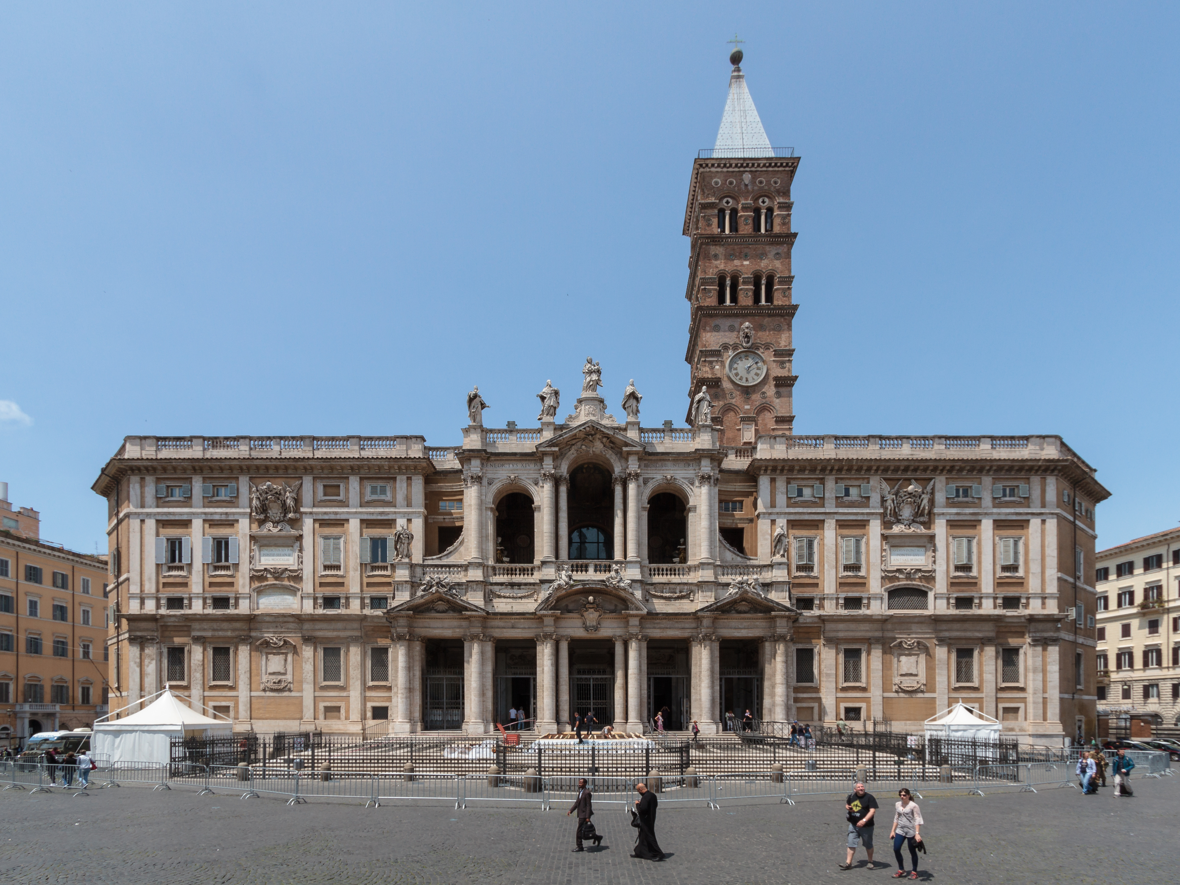 Basilica di Santa Maria Maggiore Native nameBasilica di Santa Maria MaggioreLocationRome, ItalyCoordinates41° 53′ 51″ N, 12° 29′ 55″ E Established432 CEWeb page control : Q186282 VIAF: 317121634 LCCN: n88227199 GND: 4228647-5 SUDOC: 079293220 WorldCat